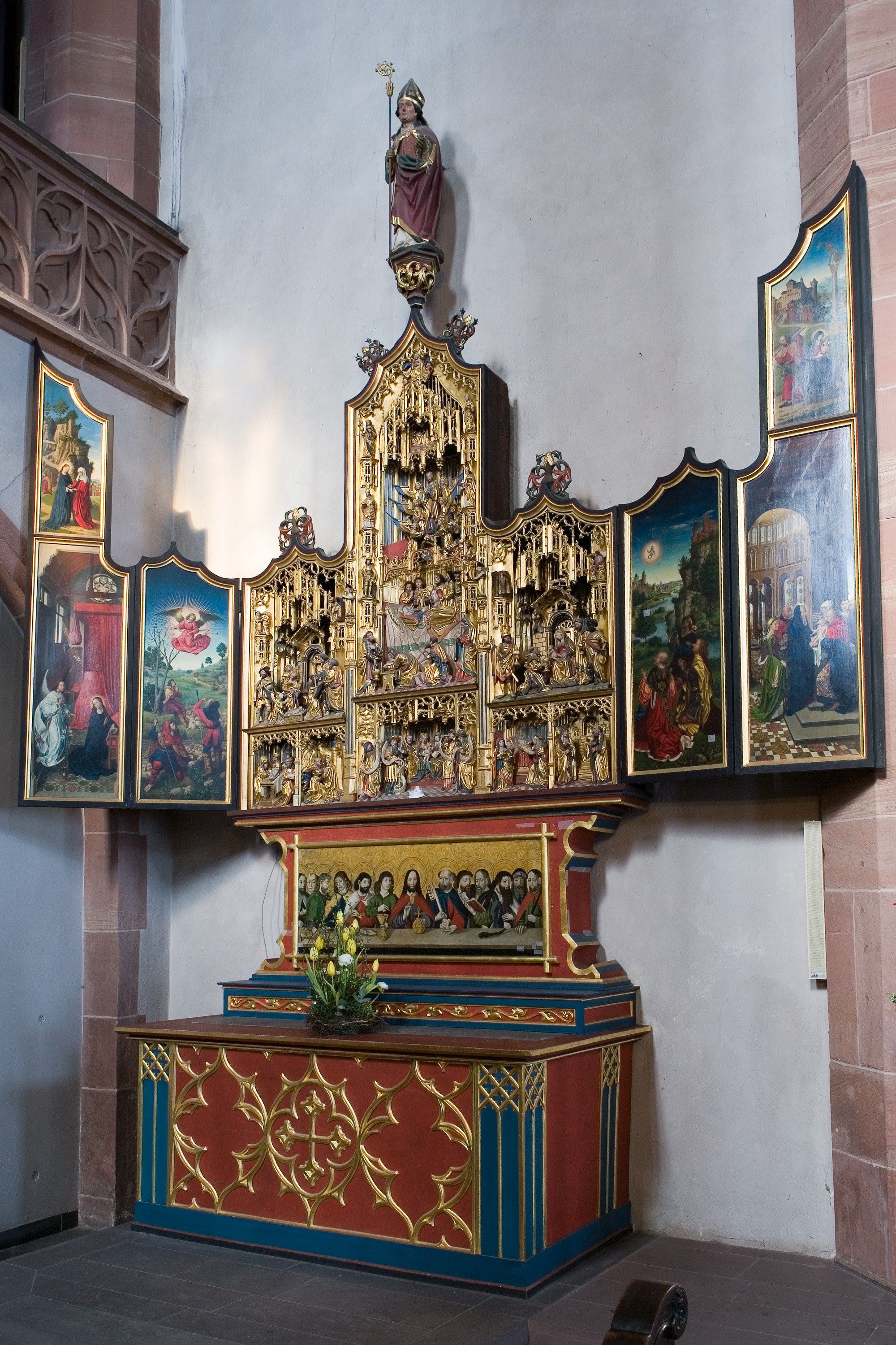 Marienaltar (um 1480, Antwerpen) im nördlichen Hauptschiff der Leonhardskirche in Frankfurt am Main, geöffneter Zustand. Selber fotografiert im März 2008, Doppellizensierung GFDL & CC-BY-SA 2.5.